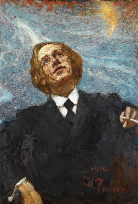 В предаукционном каталоге Сотбис 2007 года написано, что предположительно это портрет Маяковского, с которым И. Репина познакомил Чуковский в 1915 г. Репин очень хотел написать его портрет, но передумал после того, как Маяковский побрил голову. Возможно, что это собирательный портрет "Поэта-футуриста". Написан на линолеуме маслом, что И.Р. иногда практиковал после революции, когда не было достаточно материала. Шелушащаяся краска по всей картине намекает на то, что картина написана левой рукой в период, когда И.Р. начал терять функции правой руки. Подпись по-русски в правом нижнем углу и дата 1916